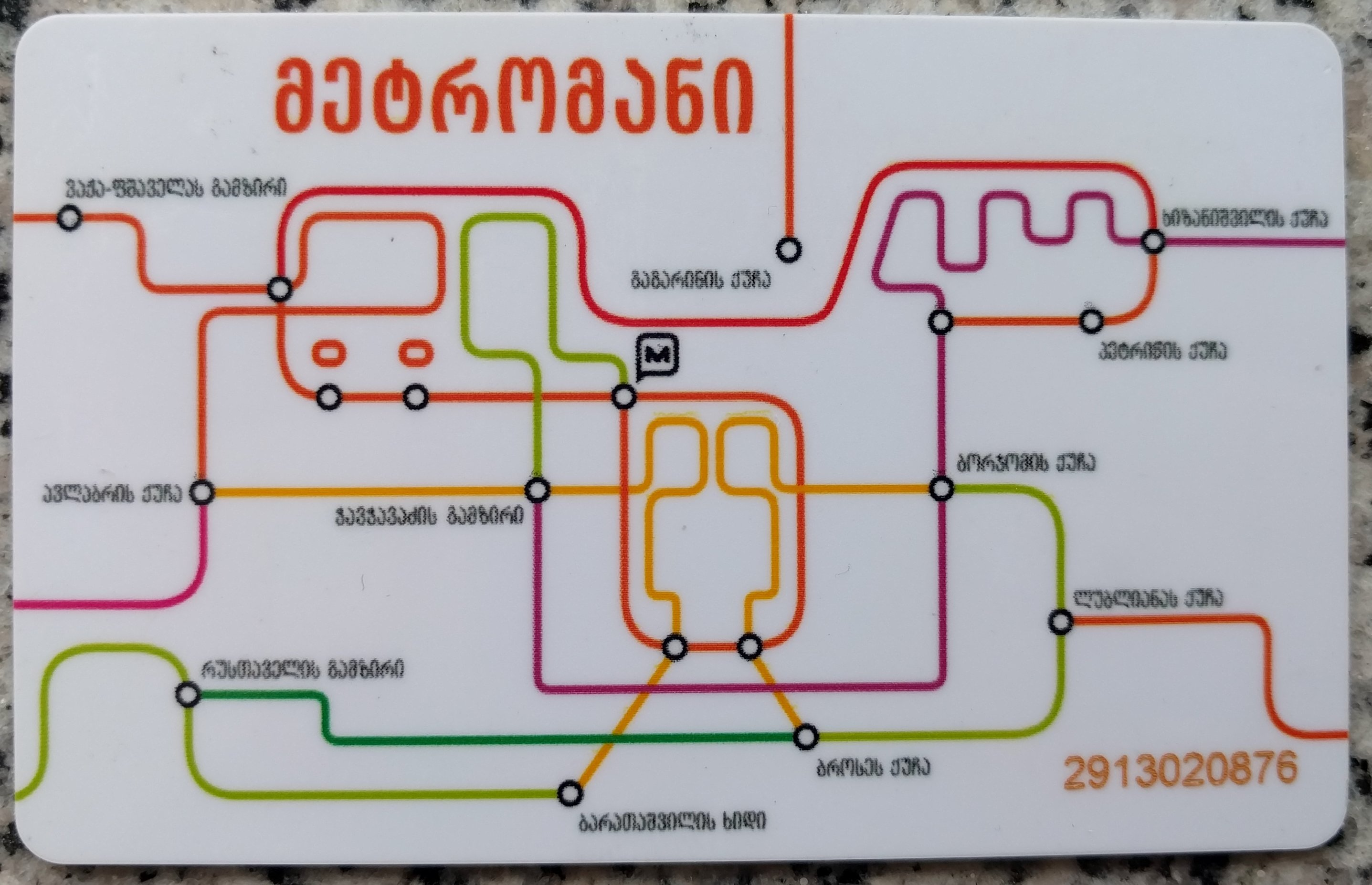 Metro Ticket Tbilisi